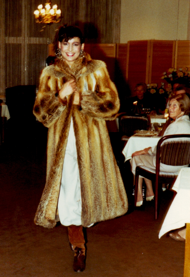 Pelzmodelle Fahnenstich, Recklinghausen Modenschau 1983 Mantel aus europäischem Rotfuchs